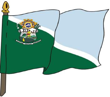 Bandeira do município de Araçoiaba da Serra, estado de São Paulo, Brasil